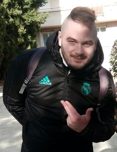 JUL à la pente.